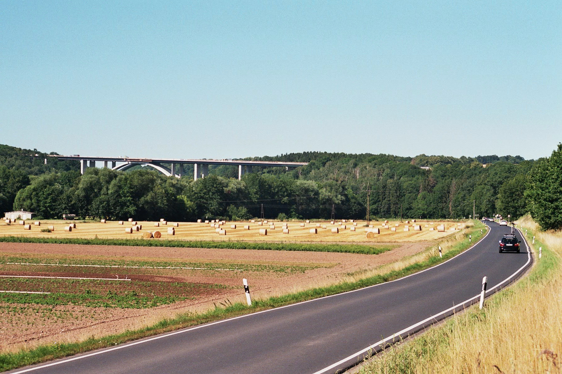 Seidewitz: Blick in das Seidewitztal nahe der Eulmühle, im Hintergrund die Talbrücke der Autobahn 17 Dresden - Prag